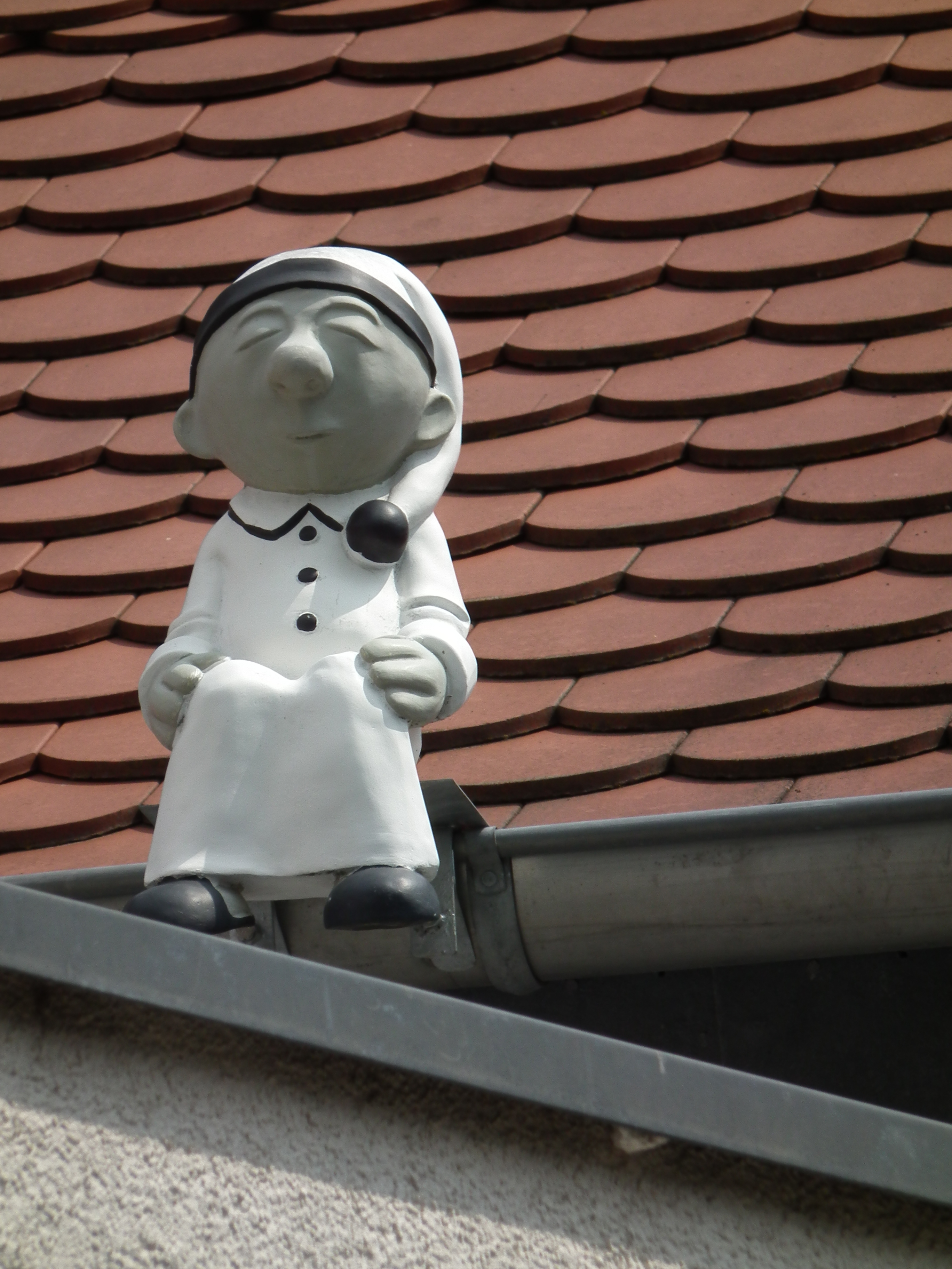 Figur eines Schlafwandler, fotografiert auf einem Hausdach